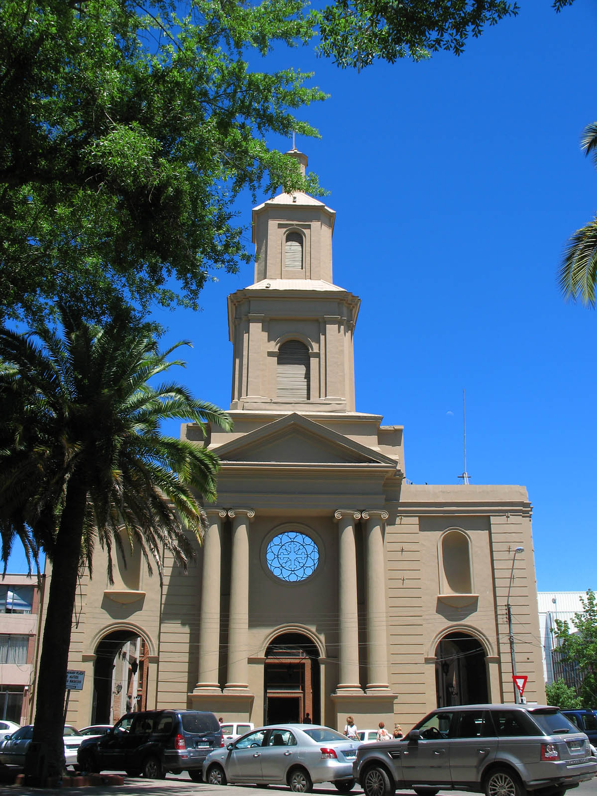 iglesia matriz